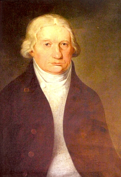 Josef Rosenauer (1735 - 1804), Český inženýr.